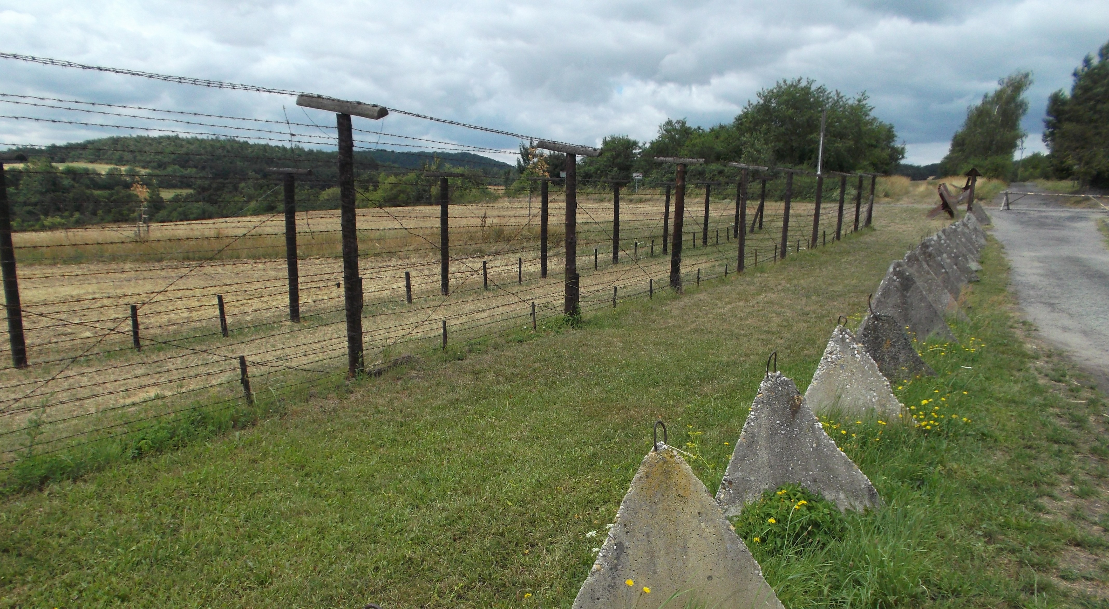 Zachovalé zvyšky tzv. Železnej opony